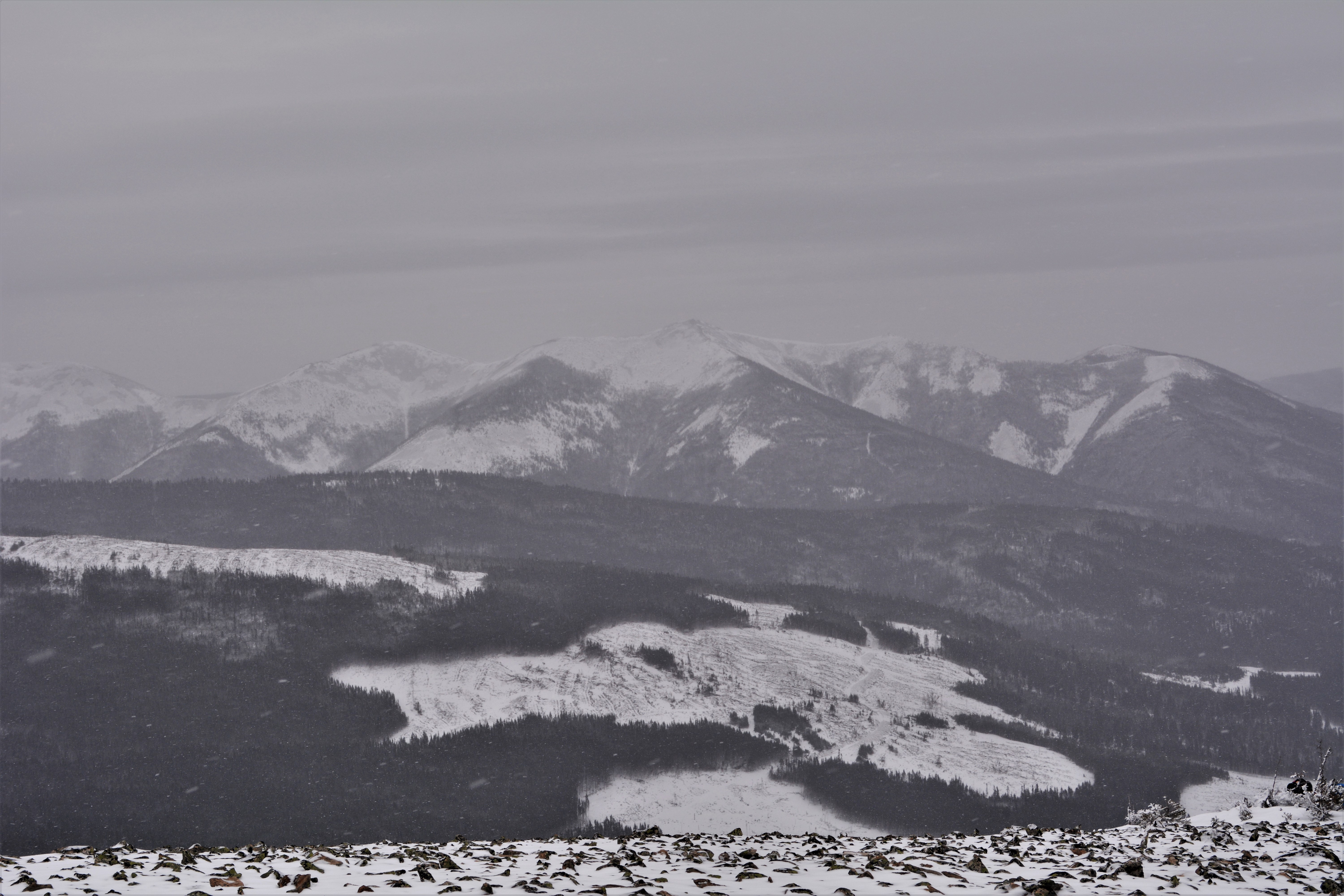 Vue sur les monts Chic-Chocs en hiver à partir du sentier du Mont Hog's Back dans la réserve faunique des Chic-Chocs